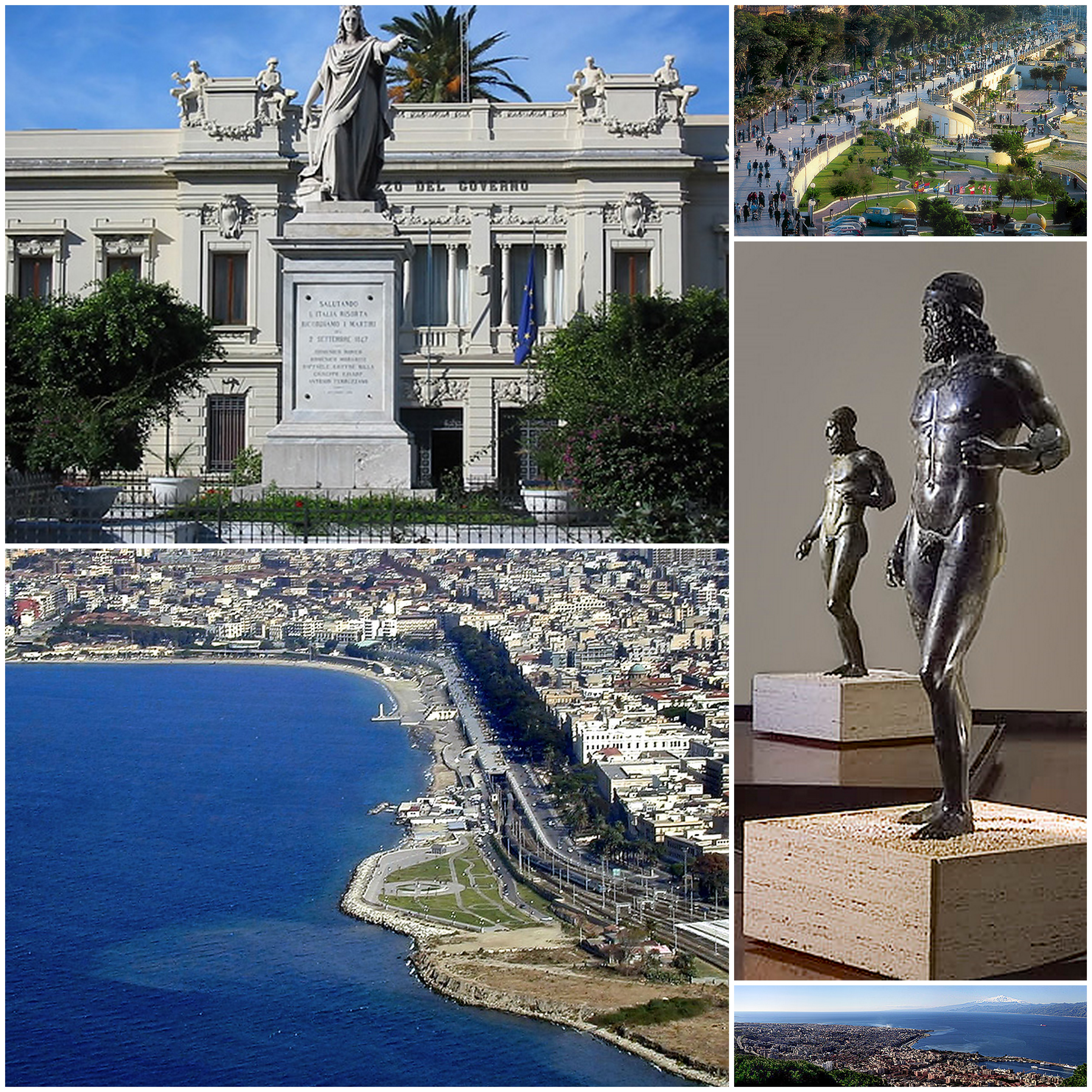 Collage di varie foto di Reggio Calabria